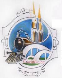 Emblema del barrio porteño Constitución (Ciudad Autónoma de Buenos Aires).